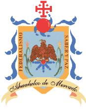 A iniciativa del H. Ayuntamiento de Ahualulco de Mercado se lanzó una convocatoria a la ciudadanía a participar en un concurso para elaborar el escudo representativo del municipio. En dicho certamen resultó ganador el diseño presentado por el Profesor Enrique Sigala Murillo. El blasón fue aprobado por unanimidad en sesión de Cabildo de fecha 26 de abril de 2002, quedando asentado en el acta número 065.